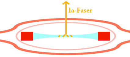 Muskelspindel; selbst erstellt; gemeinfrei